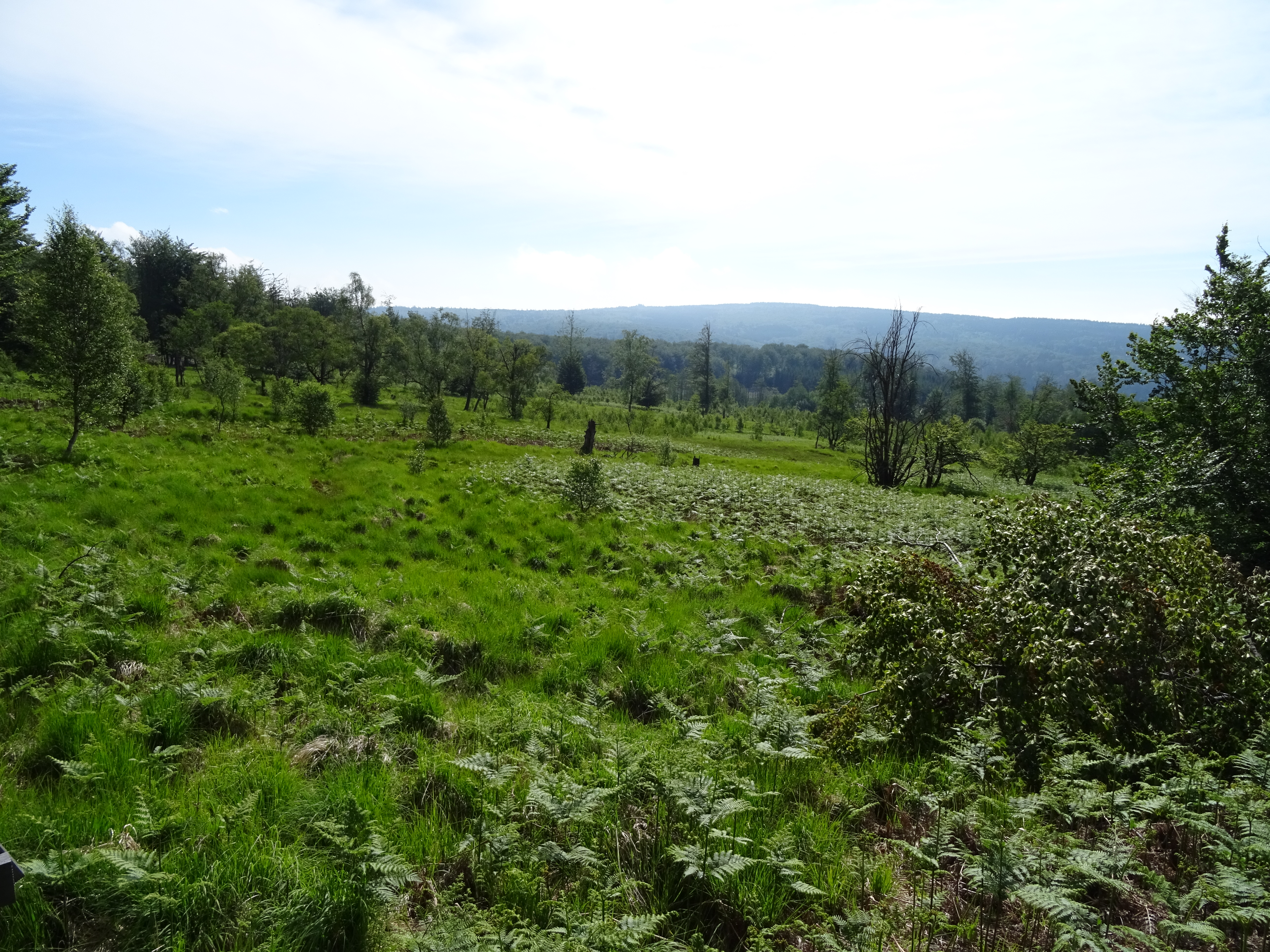 Moorgebiet